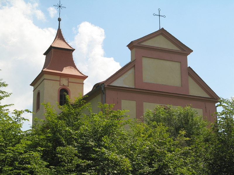 Kostel sv. Mikuláše (Čermná), Čermná, Čermná (Libouchec).